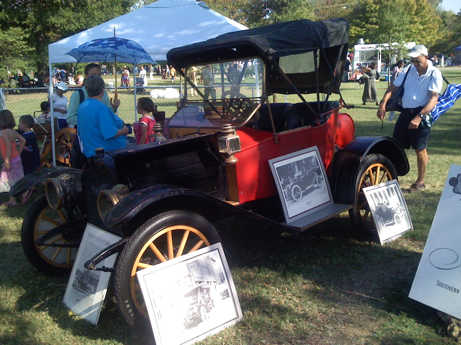 Marathon automobile